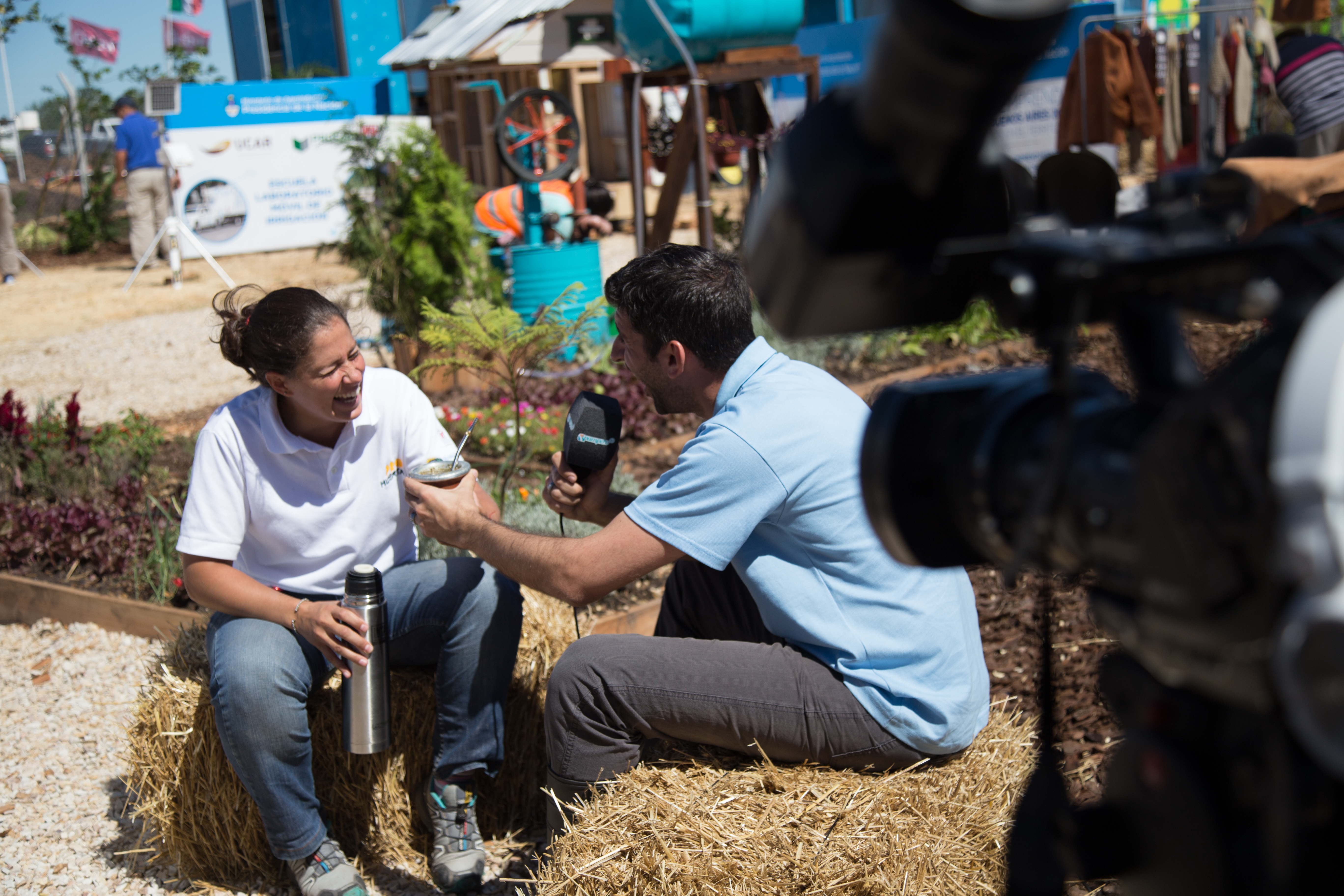 Entrevista a Sofia Ines Arri, tecnica de prohuerta San Pedro, para el programa Pampero TV en 11° edición de Expoagro, San Nicolas, provincia de Buenos Aires.